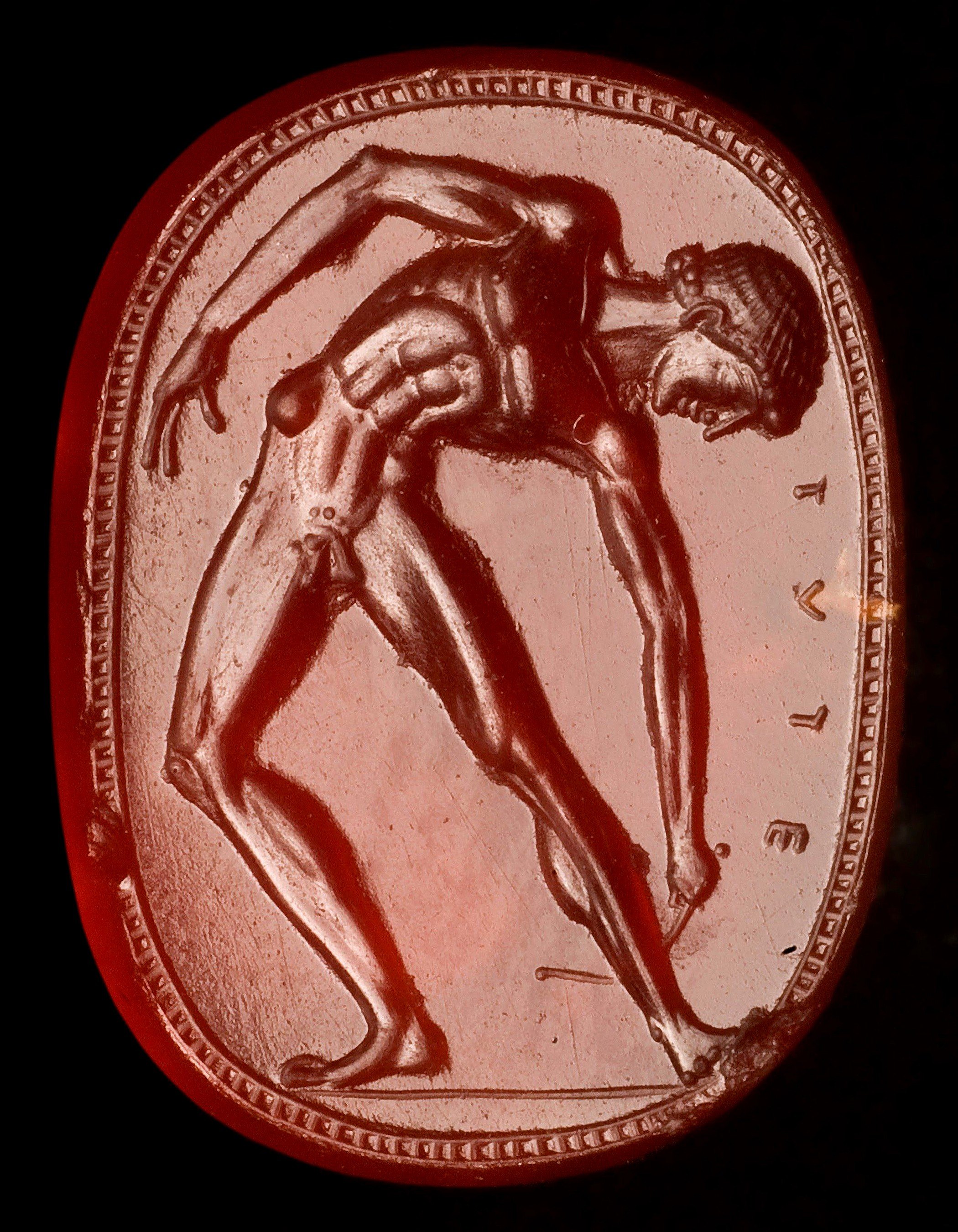 Etruskischer Skarabäus mit Tydeus Siegelseite: Tydeus mit Beischrift als Athlet mit Strigilis Standort: Antikensammlung, Staatliche Museen zu Berlin Material: Karneol Maße: Länge 1,4 cm; Breite 1,1 cm; Dicke 0,2